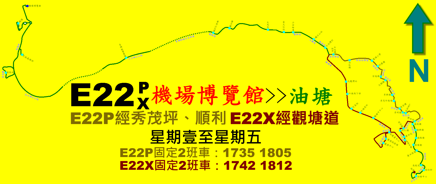 中文（香港）: 城巴E22P線(泥黃)及E22X線(棕)往九龍方向的走線圖